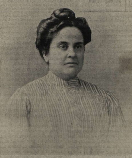 Virginia González. Notable propagandista y Presidenta del Grupo Socialista Femenino de Madrid.